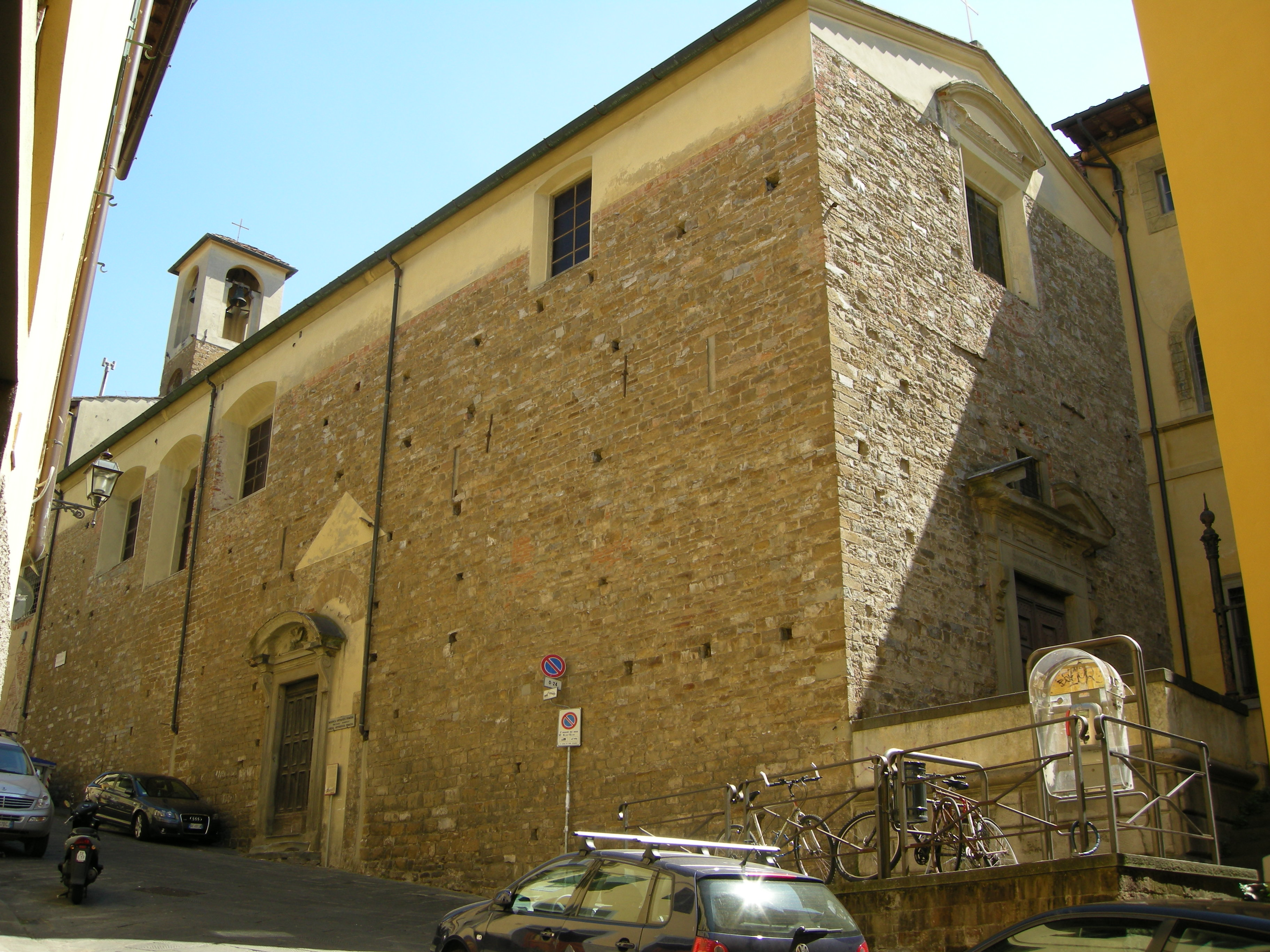 San giorgio alla costa